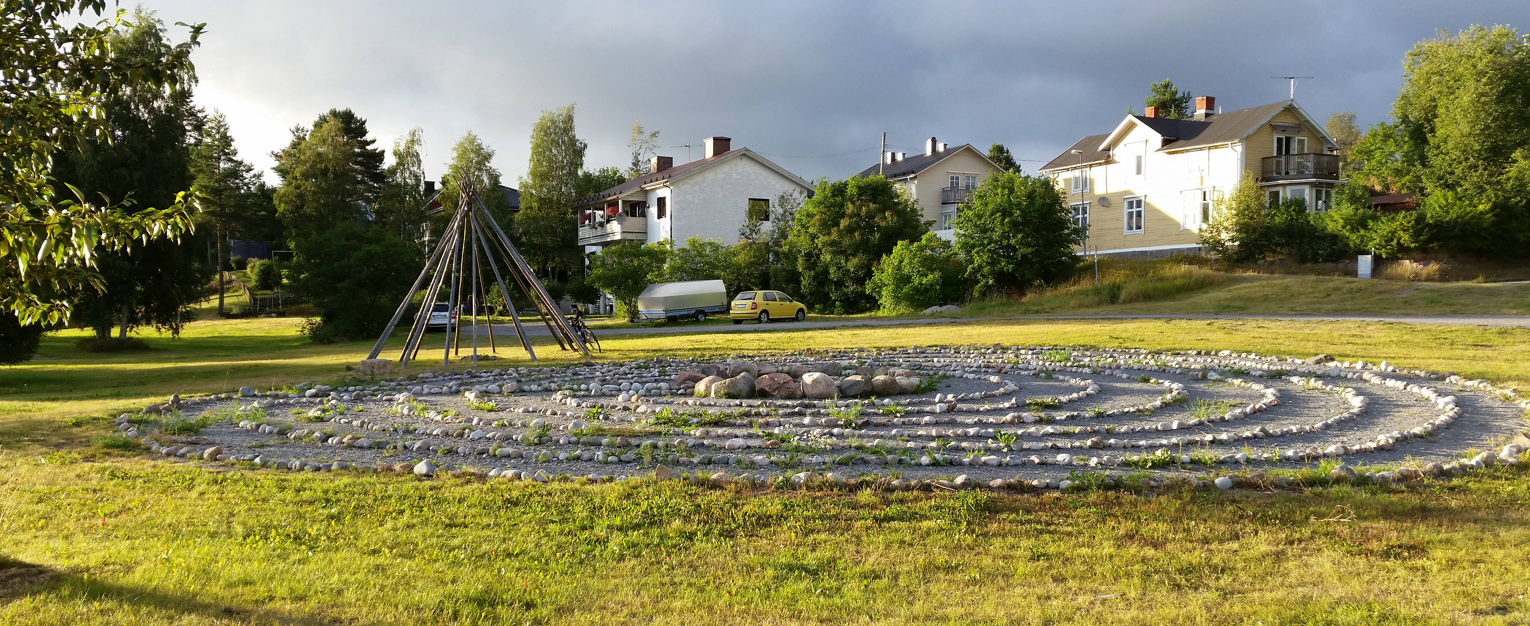 Trojaburg bei Luleå